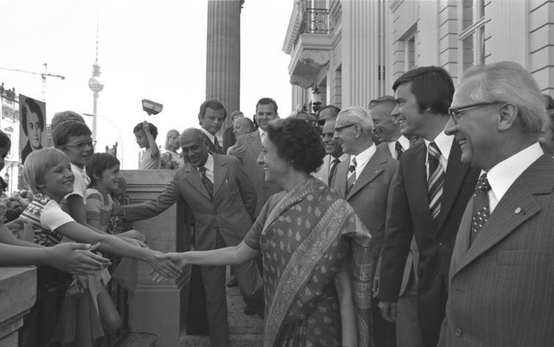 ADN-ZB/ 3.7.76 Berlin: Ghandi-Besuch-Fortsetzung der Gespräche . Ihren ersten Ferientag nutzten viele Berliner Kinder, um den indischen Ministerpräsidenten, Frau Indira Gandhi (Mitte), zu begrüßen wie hier vor dem Palais Unter den Linden, wo am 3.7. die offiziellen Gespräche wieder aufgenommen wurden. Zugegen waren Erich Honecker (r.) , Generalsekretär des ZK der SED, Willi Stoph (3.v.r.) und weitere Persönlichkeiten.